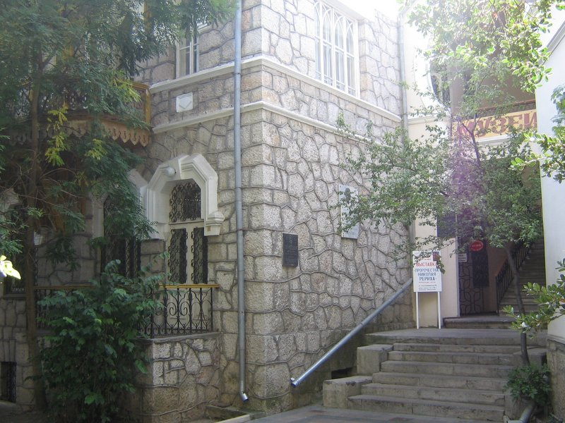 Ялтинський музей Лесі Українки